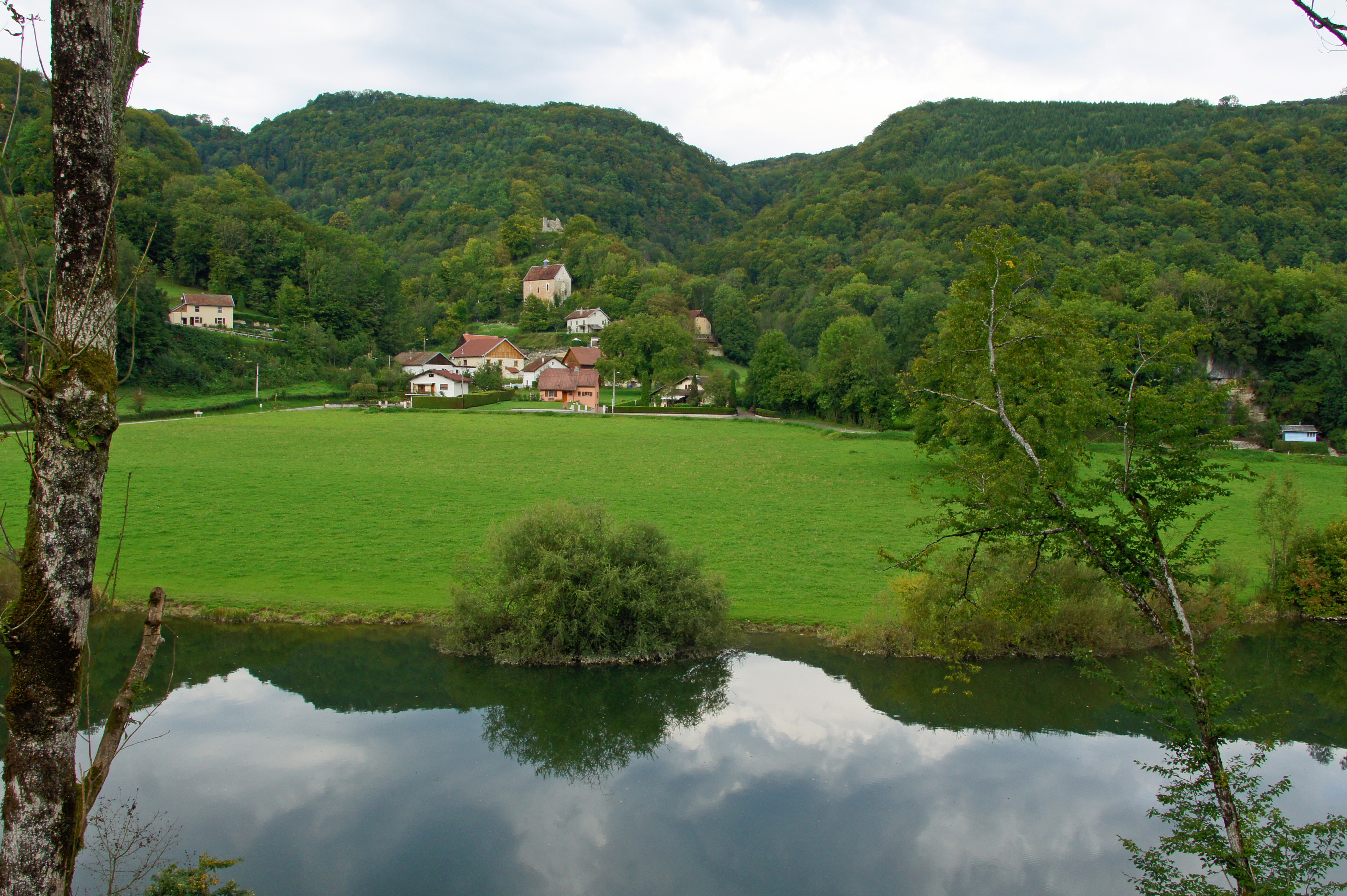 Montjoie-le-Chateau von Doubs gesehen